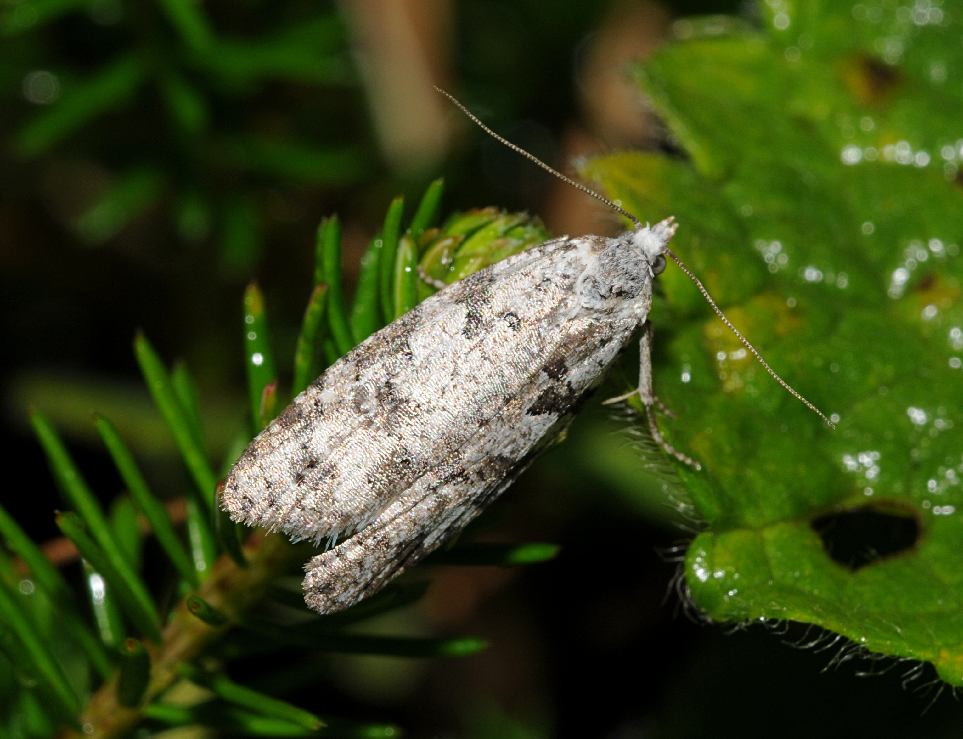 Eana penziana Location: Großer Buchstein, Gesäuse National Park, Styria, Austria 8 EX DG APO IF Makro f/11 Film / Speed: ISO 200 Comment: identification: Heinz Habeler